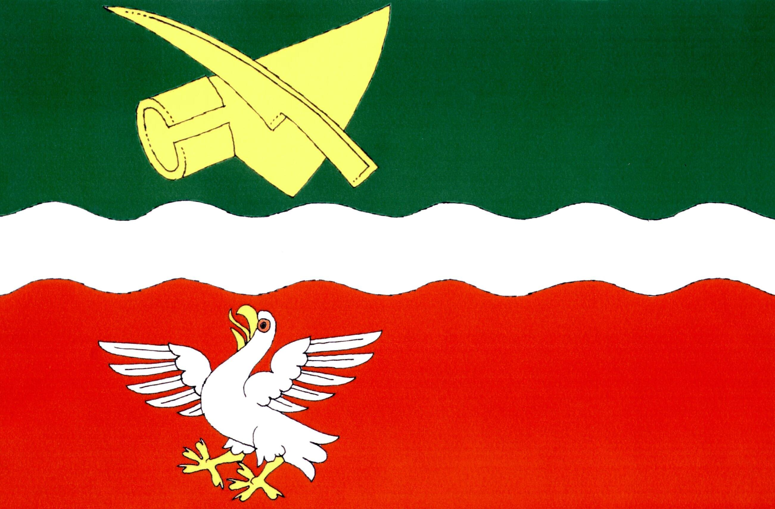 Vlajka obce Rájec-Jestřebí